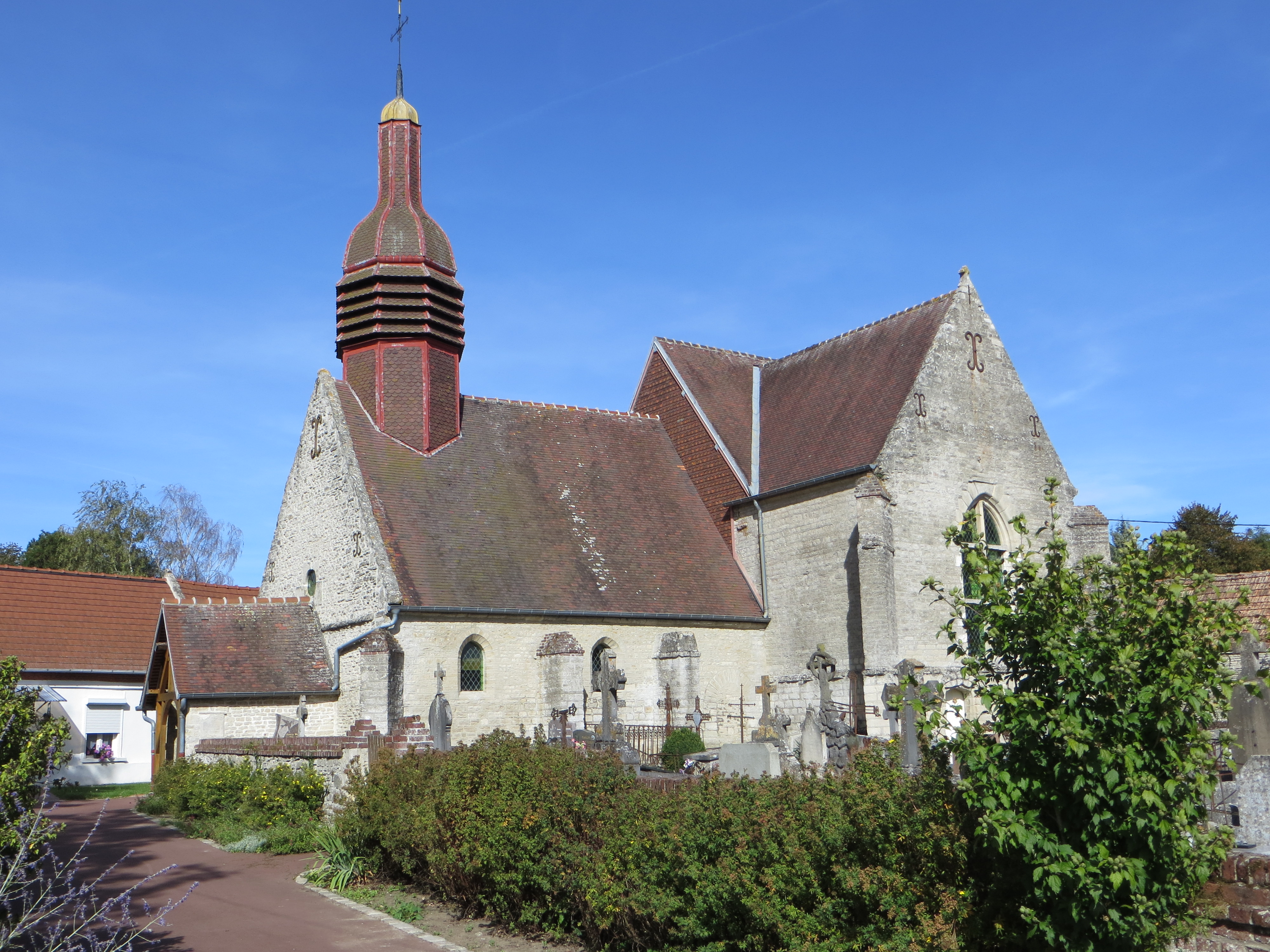 Vue générale de l'église